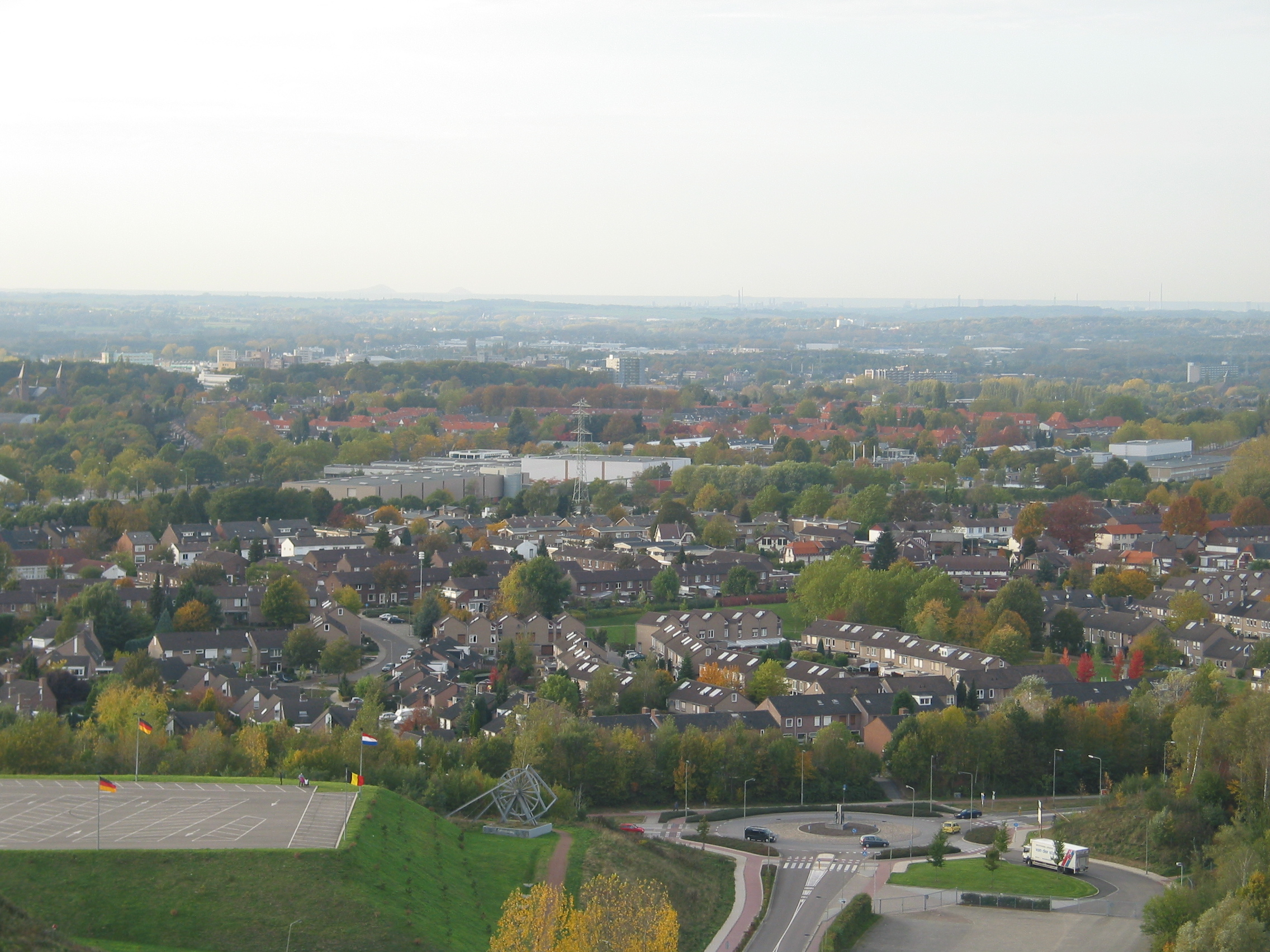 Uitzicht van de Wilhelminaberg op een deel van het Eikske. De mijnwerkersbuurten zijn duidelijk te zien